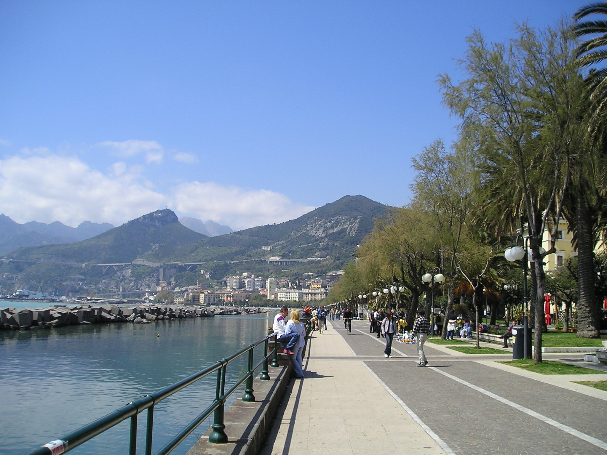 Salerno, seafront promenade